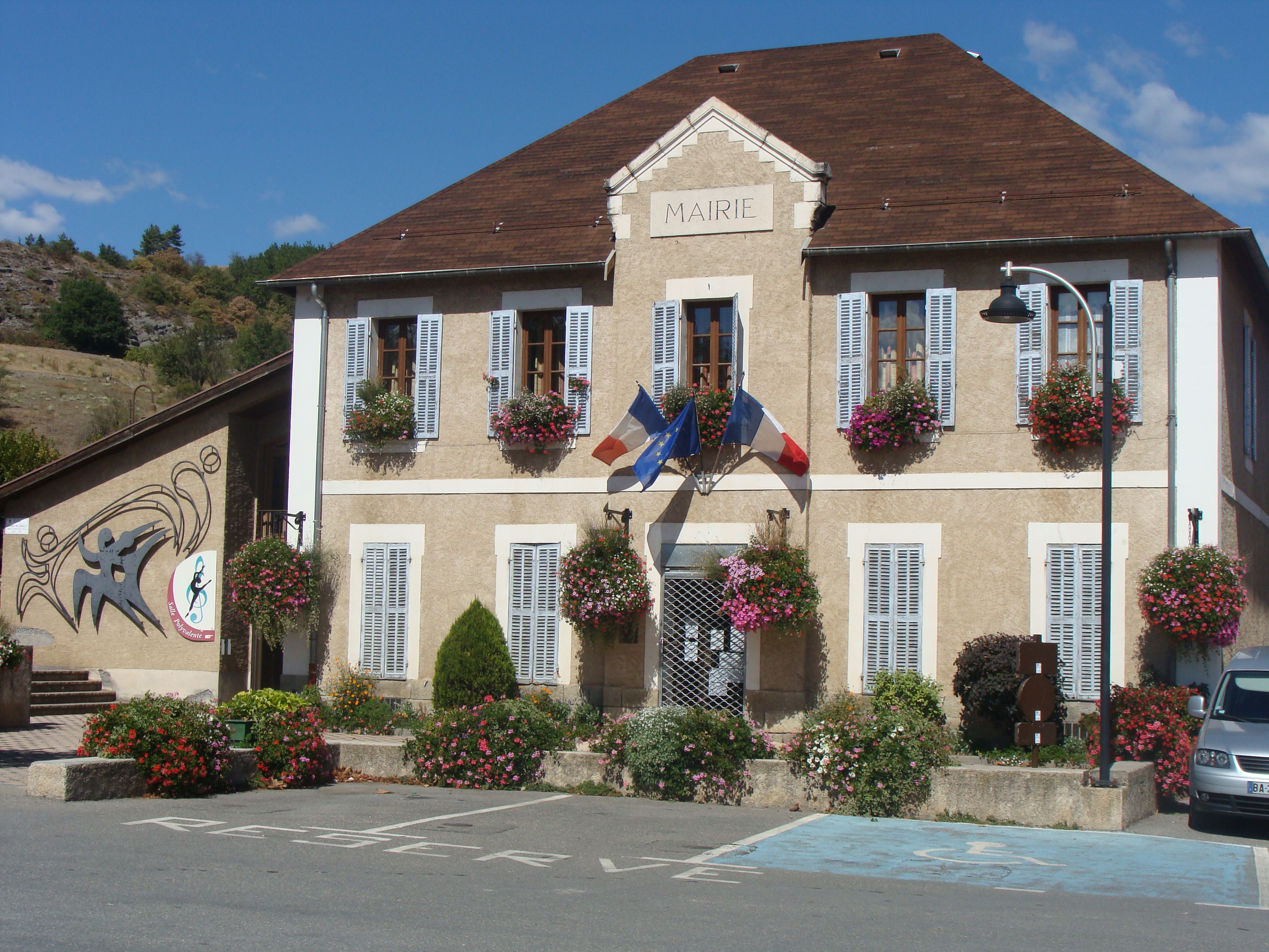 La mairie de Tallard, sur la place Général-de-Gaulle.